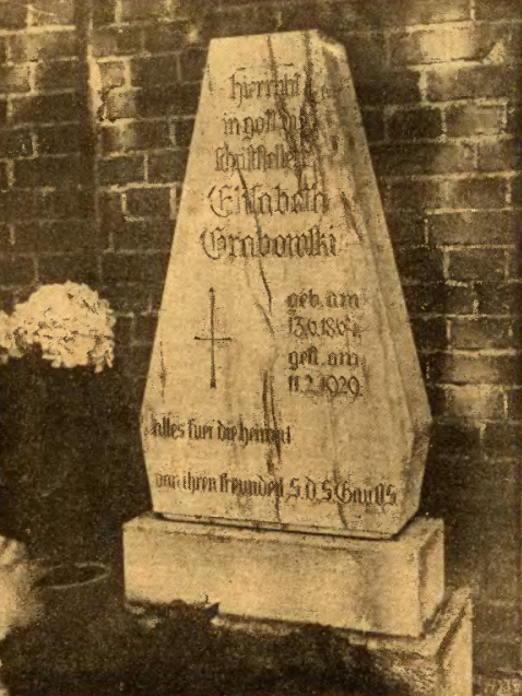 Das Grabdenkmal für die Schriftstellerin Elisabeth Grabowski in Oppeln.